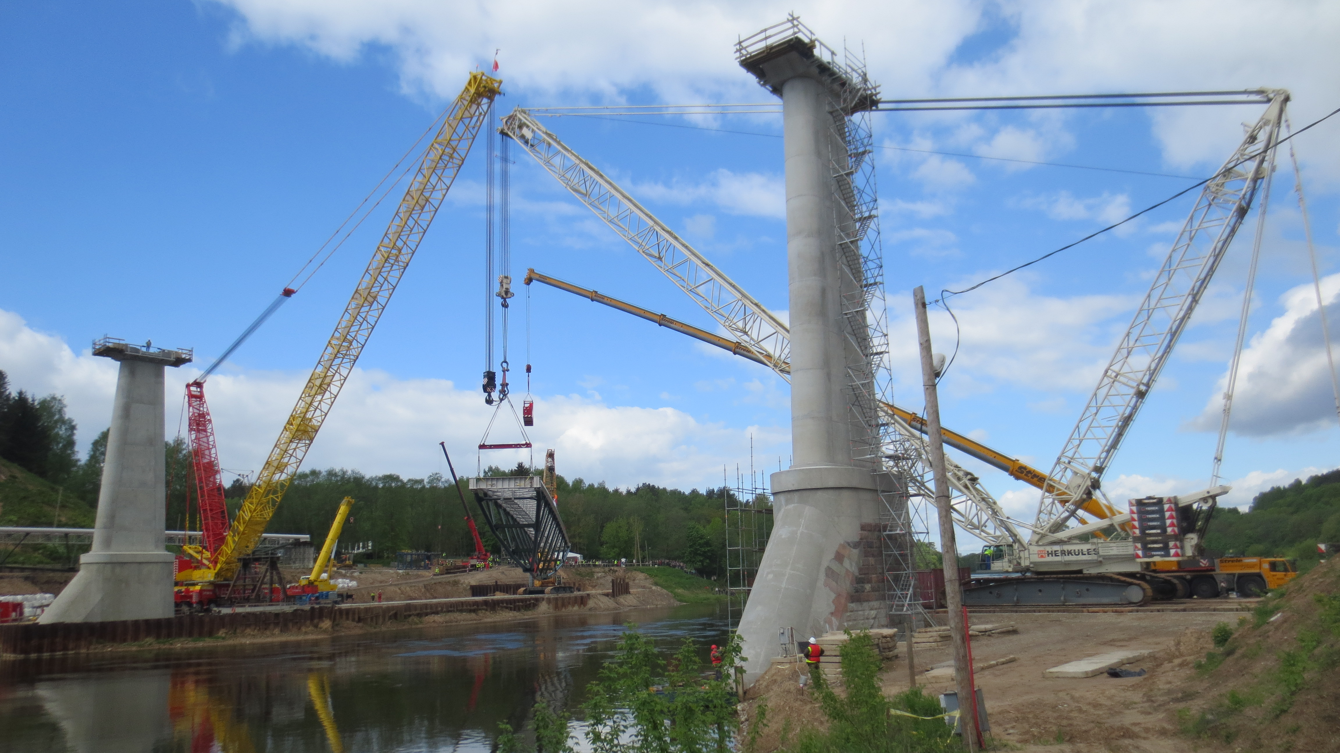 Centrinio tarpatramio perdangos užkėlimas ant taurų